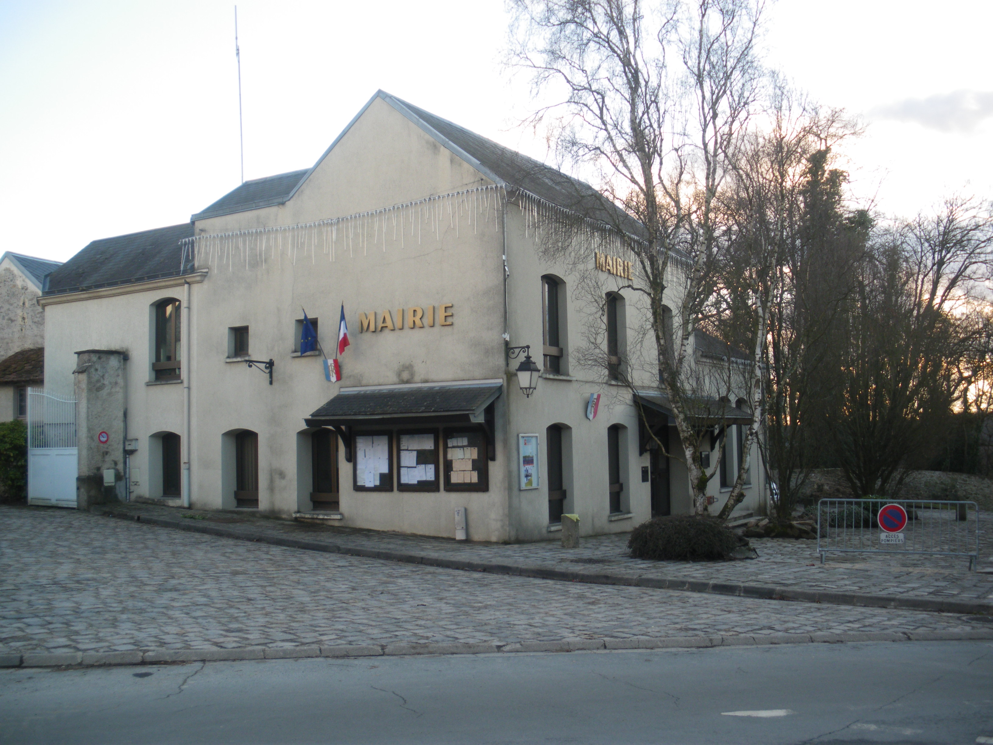 Mairie de Villiers le Bacle, Essonne, France